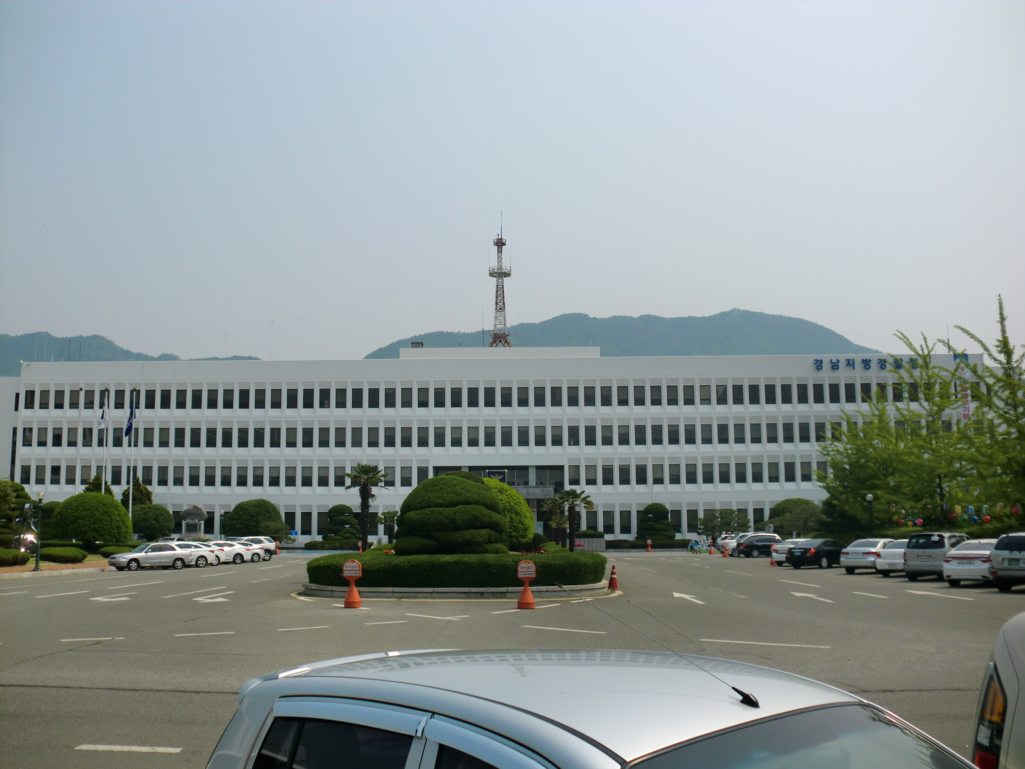 경상남도 창원시에 있는 경남지방경찰청